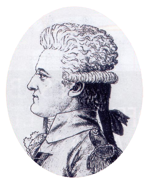 Amiral Villeneuve (1763-1806), portrait contemporain See also Image:Vice-Amiral Pierre Charles de Villeneuve.jpg